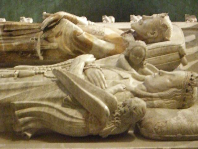 Figures jacents de Joan I i Violant de Bar a Poblet